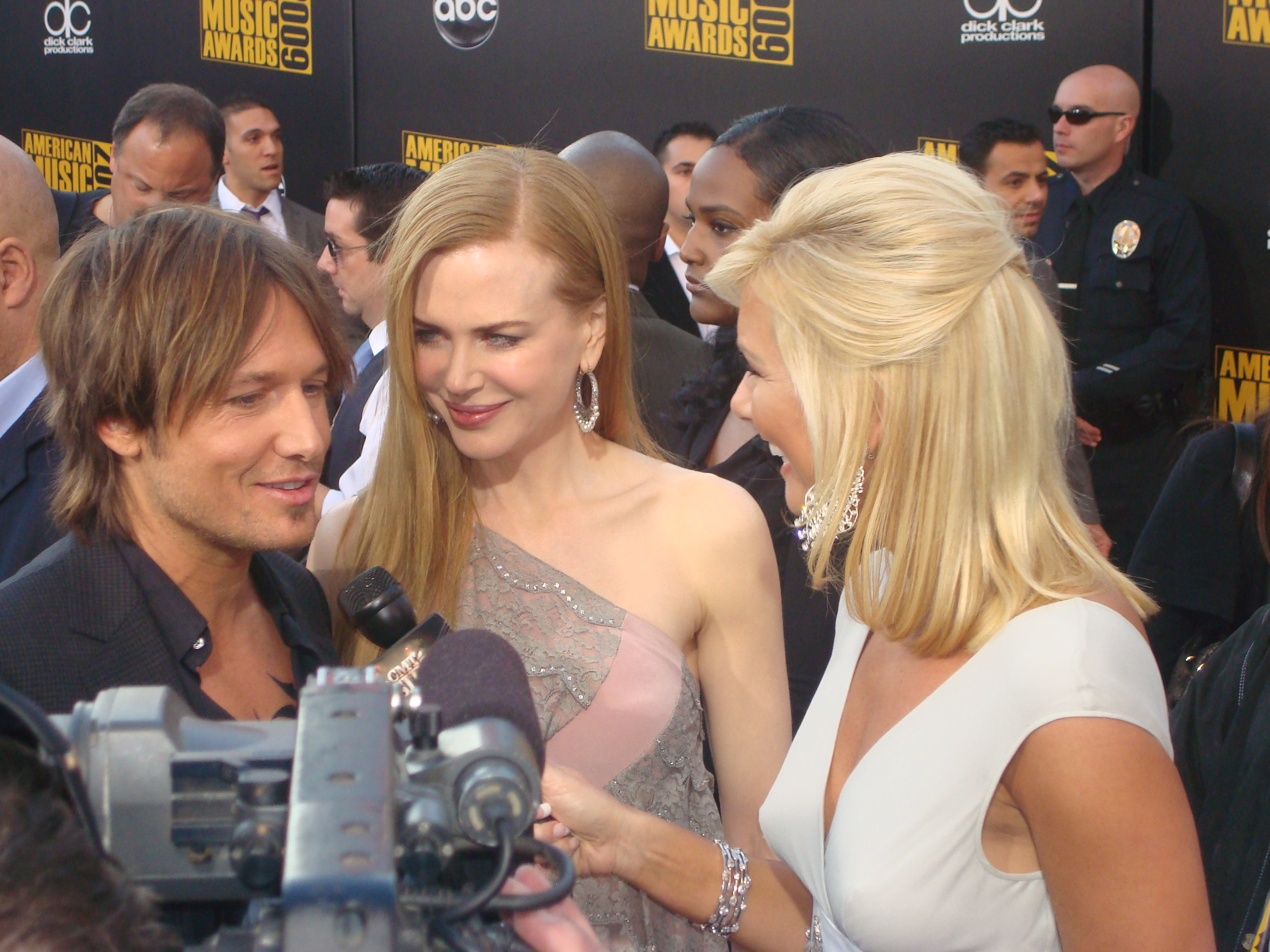 Nicole Kidman no American Music Award (2009)